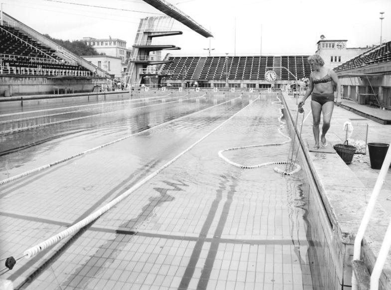 ADN-ZB-Deutsche Demokratische Republik 31.8.1971 schw Im Leipziger Schwimmstadion... ...treten am 3. und 4.9.1971 die Schwimmer und Wasserspringer der DDR und der USA zu einem Länderkampf an. Unser Foto zeigt einen Blick auf die Anlage. Schwimmeisterin Margot Greiner kontrolliert die Bahngrenzungen im Schwimmbecken. Foto: Gahlbeck Copyright: ADN-Zentralbild